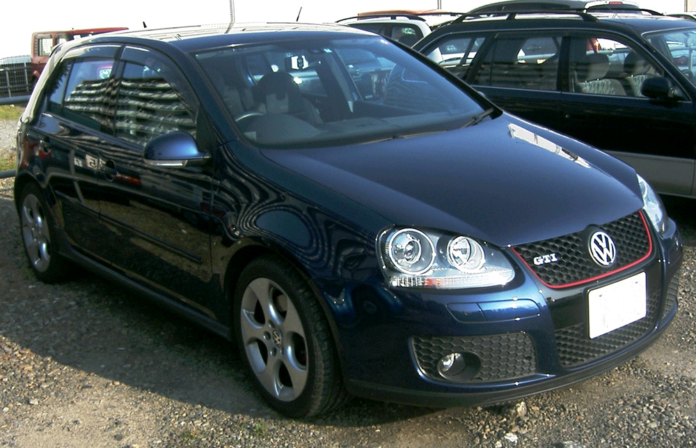 Volkswagen Golf_GTI